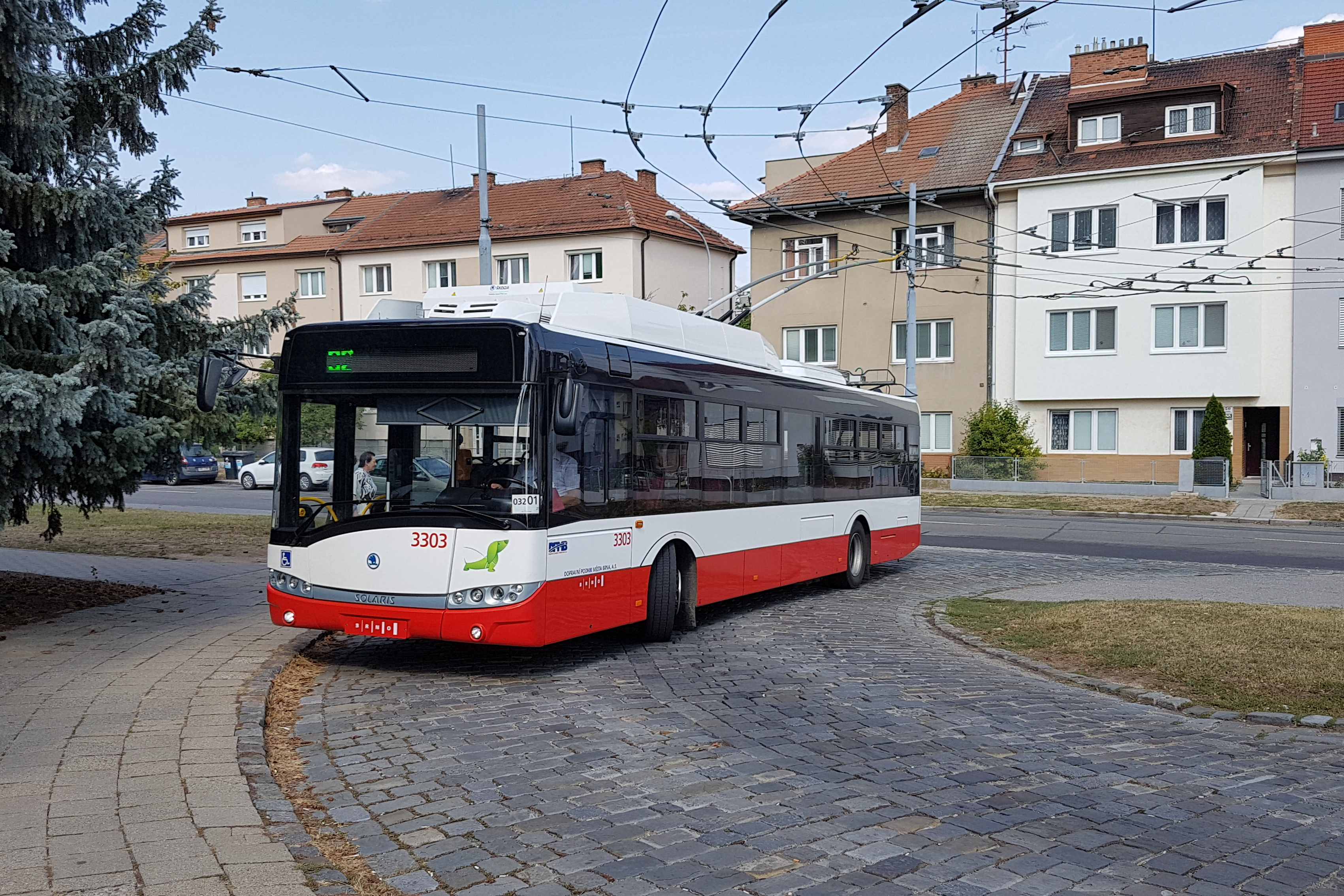 Parciální trolejbus Škoda 26Tr Solaris ev. č. 3303 v Brně ve smyčce Srbská